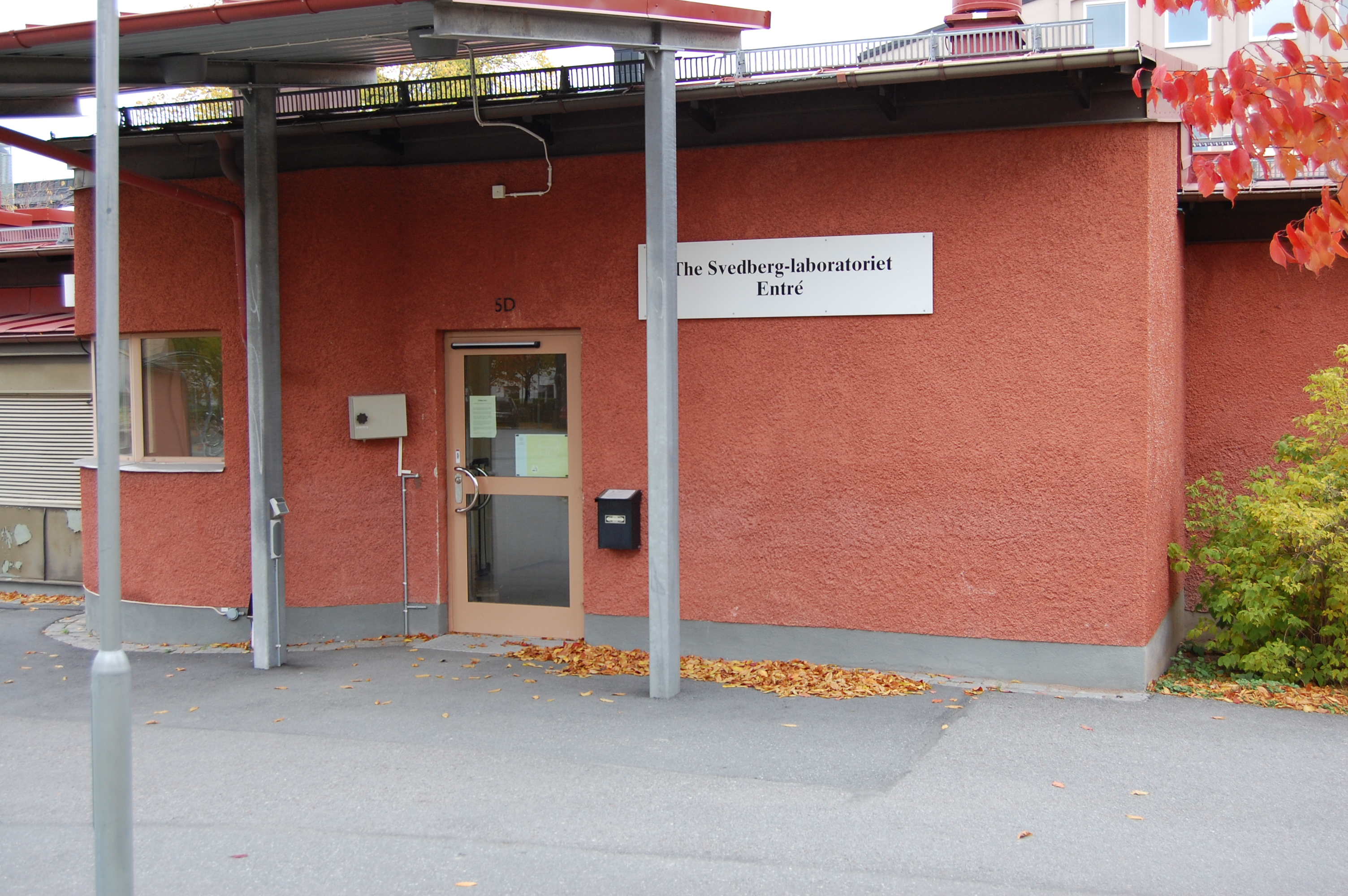 The Svedberglaboratoriet i Uppsala